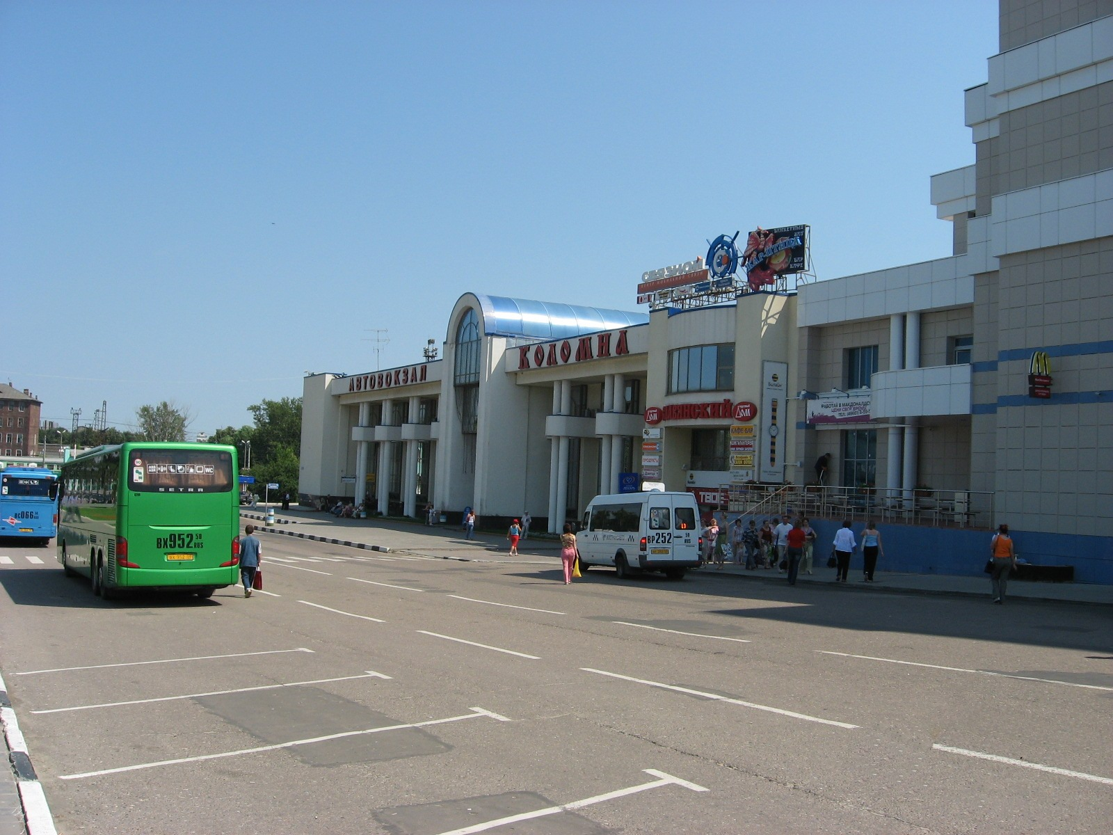 Автовокзал в Голутвине, Коломна